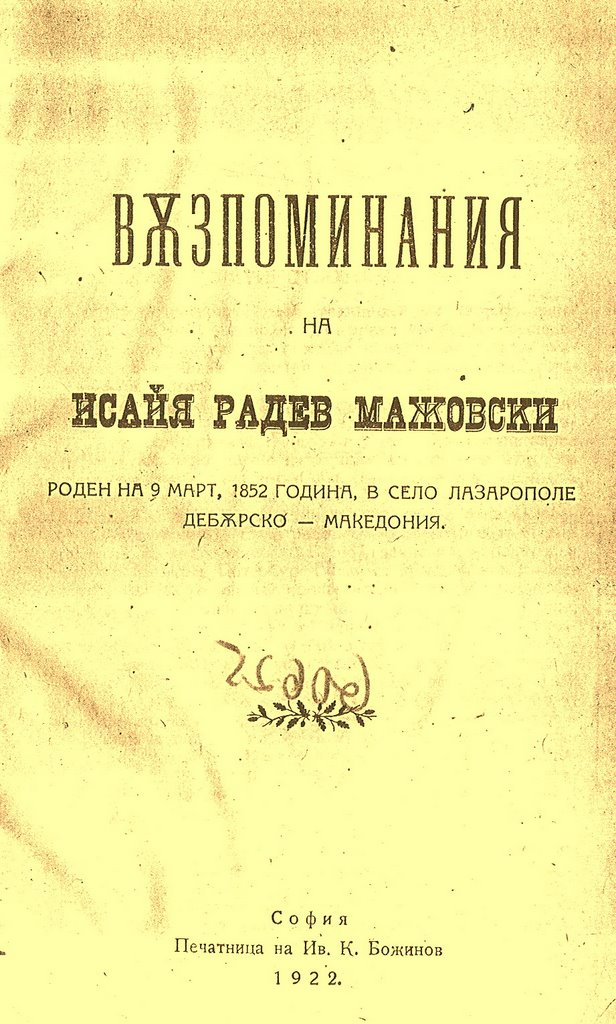 Мажовски, Исайя Радевъ (1922) Вѫзпоминания, София: Печатница на Ив. К. Божиновъ